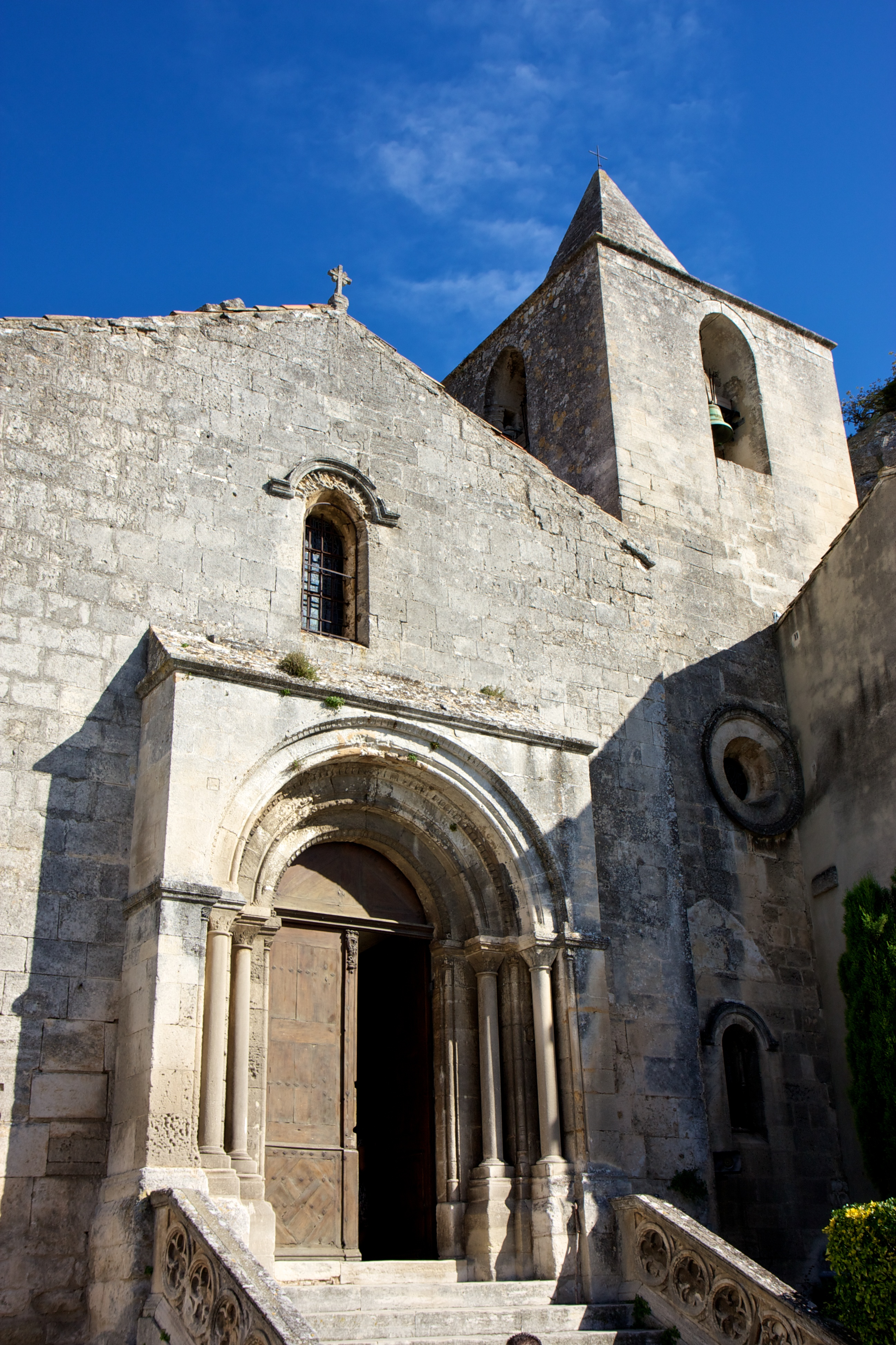 Church in Les Baux-de-Provence